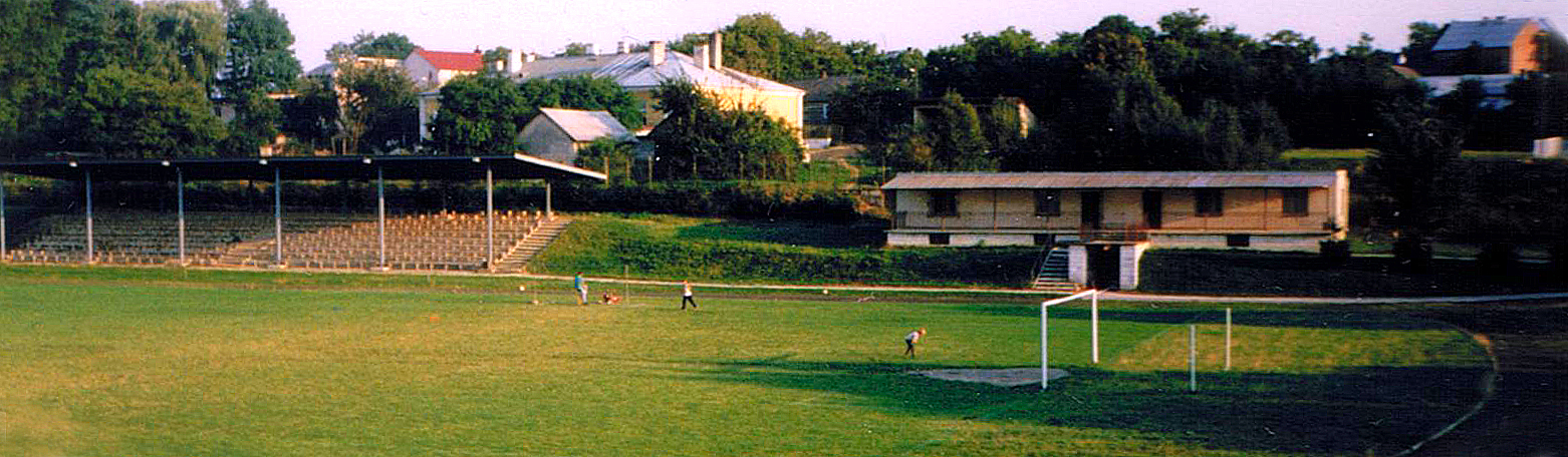 Tarnogród, Poland - Stadium • Tarnogród, Polska - Stadion